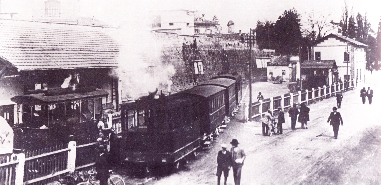 La stazione di Crema della linea tranviaria Lodi-Crema-Soncino